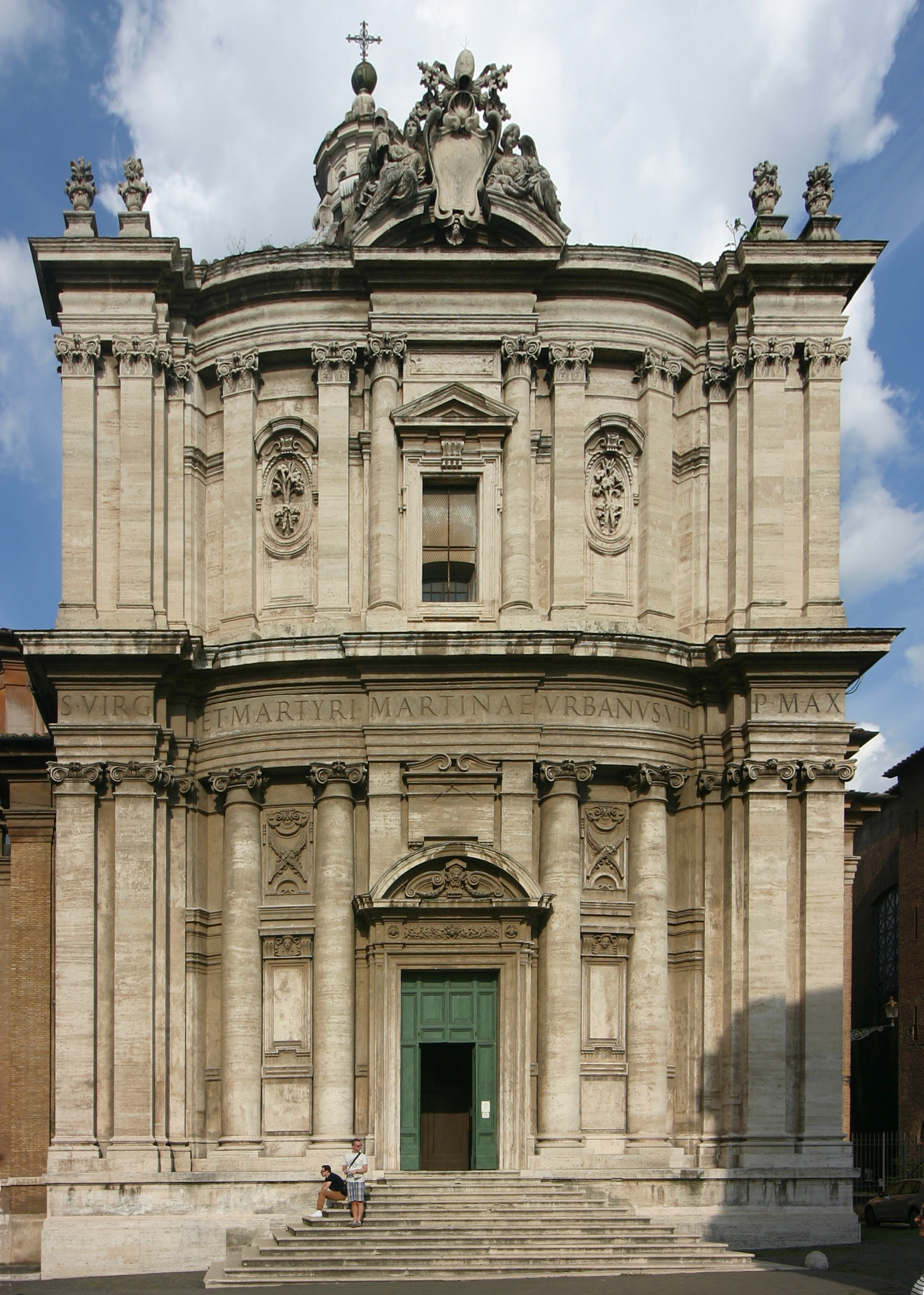 Santi Luca e Martina - Rome